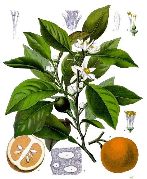 Pomeranze. A blühender und fruchtender Zweig, natürl. Grösse; B Frucht, desgl.; 1 Blüthe nach Entfernung der Kronblätter, vergrössert; 2 Blüthe im Längsschnitt, desgl.; 3 Kronblatt, desgl.; 4 Staubgefässbündel, desgl.; 5 Stempel mit Staubgefässbündel, desgl.; 6 reife Frucht im Querschnitt, natürl. Grösse; 7 unreife Fruchtrinde im mikroskopischen Querschnitt